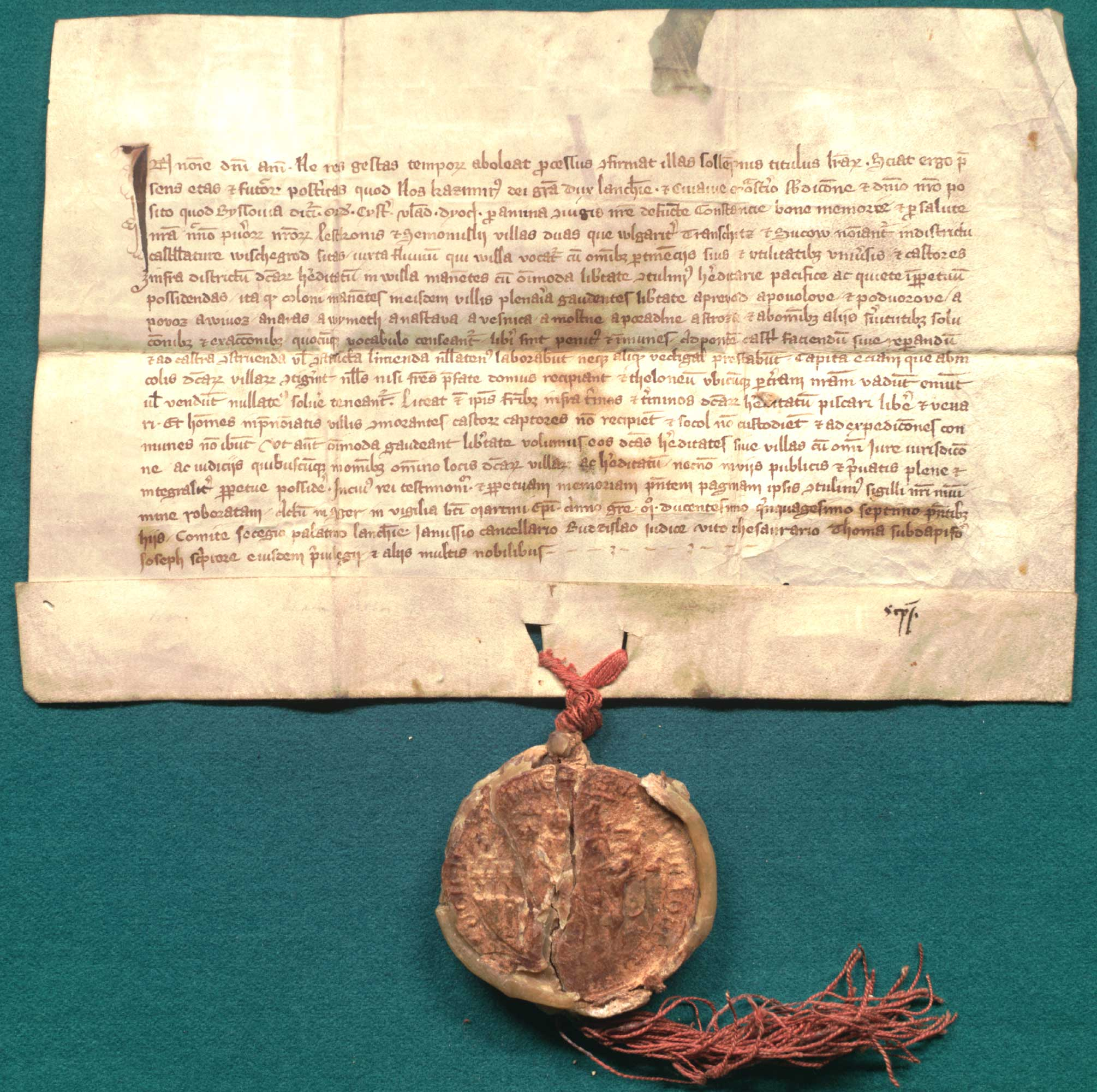 Kazimierz, ks. łęczycki i kujawski nadaje klasztorowi cystersów w Byszewie dla zbawienia duszy zmarłej żony swej Konstancji, swego własnego oraz synów Leszka i Ziemomysła, wsie Trzęsacz i Żuków w kasztelanii wyszogrodzkiej z obszernymi swobodami. Język: łac. Opis zewnętrzny: oryg., 1 k. pergaminowa, 29 x 19,2 + 3,3 cm; pieczęć na sznurze